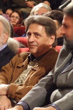 Sadegh Tabatabaei